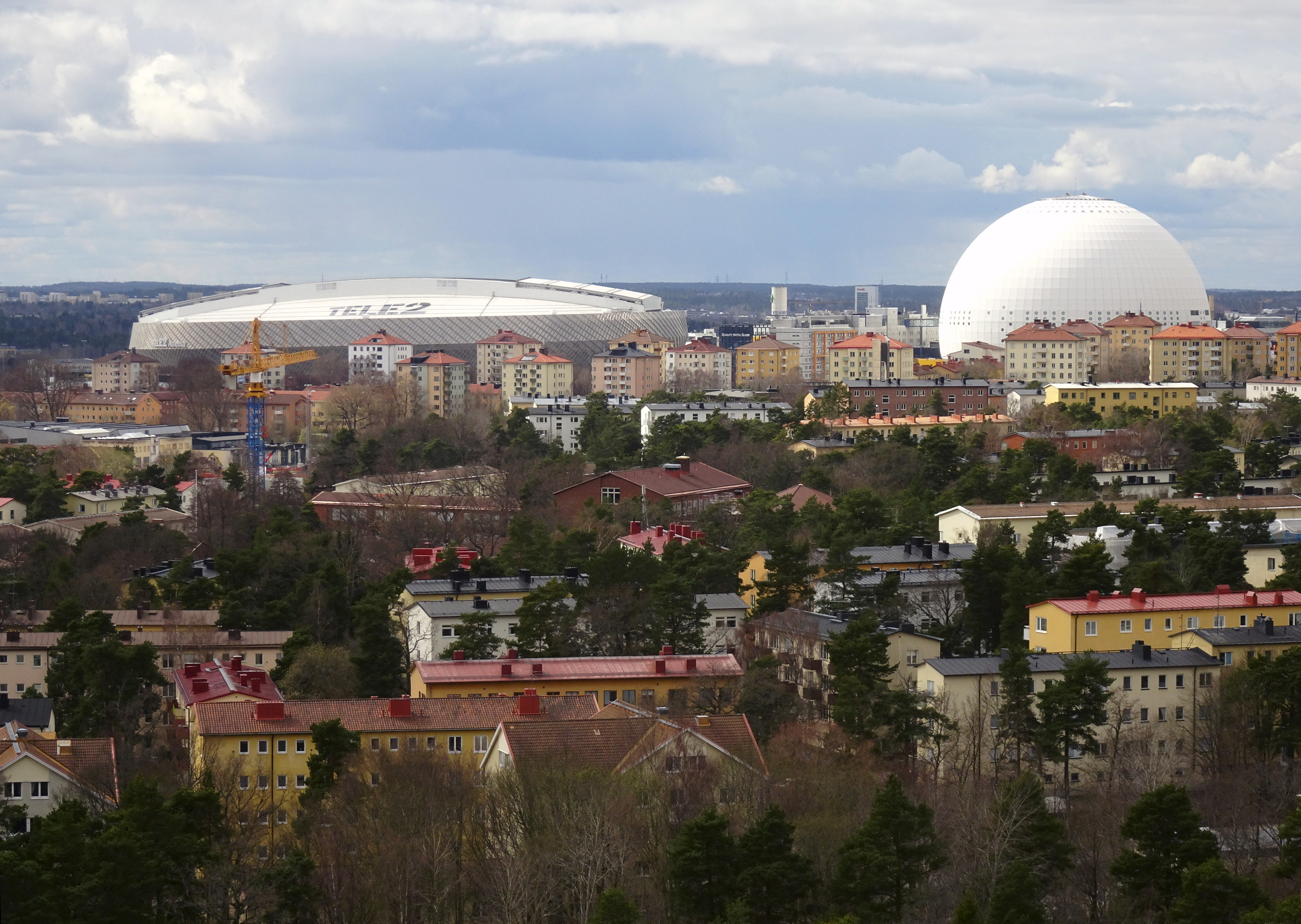 Globen och Tele 2 Arena från Hammarbybacken/toppen